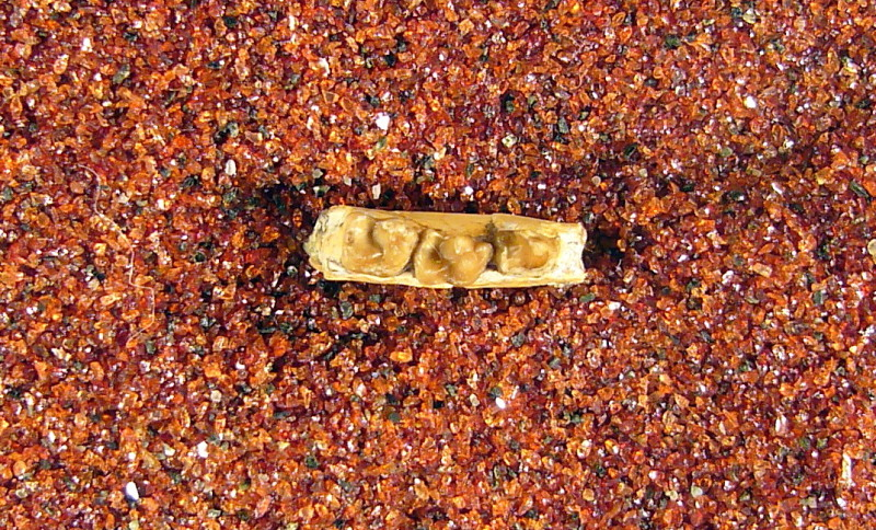 Steinius annectens Bown & Rose